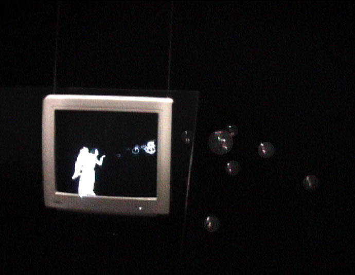 image extraite de l'oeuvre "mais,...l'ange présentée à la Multimediale à Prague